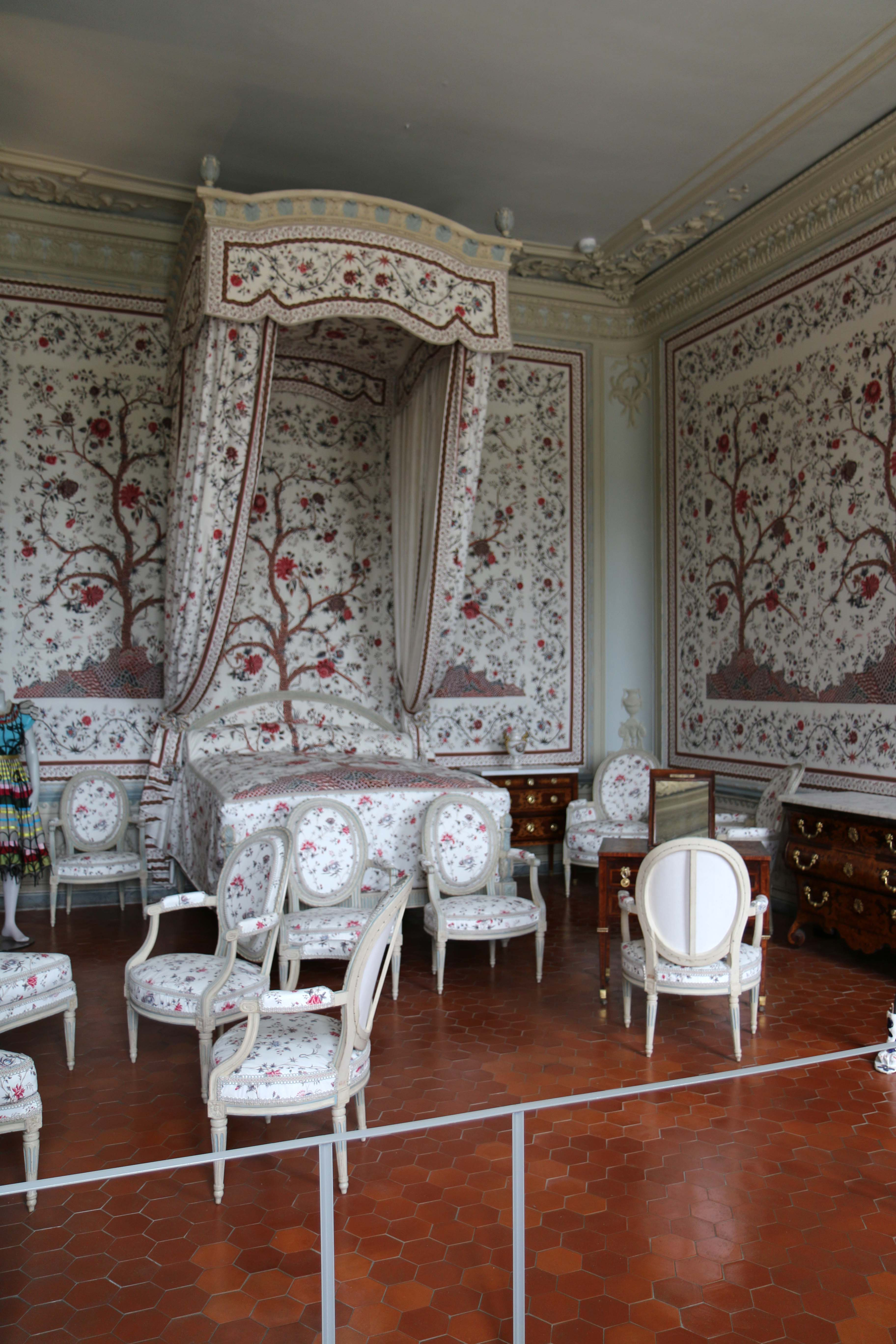 Chambre d'apparat du château Borély.